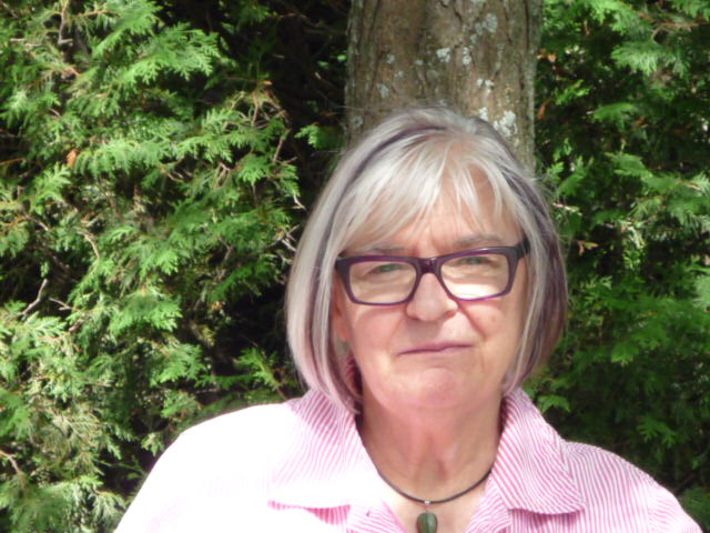 Louise Toupin en 2016